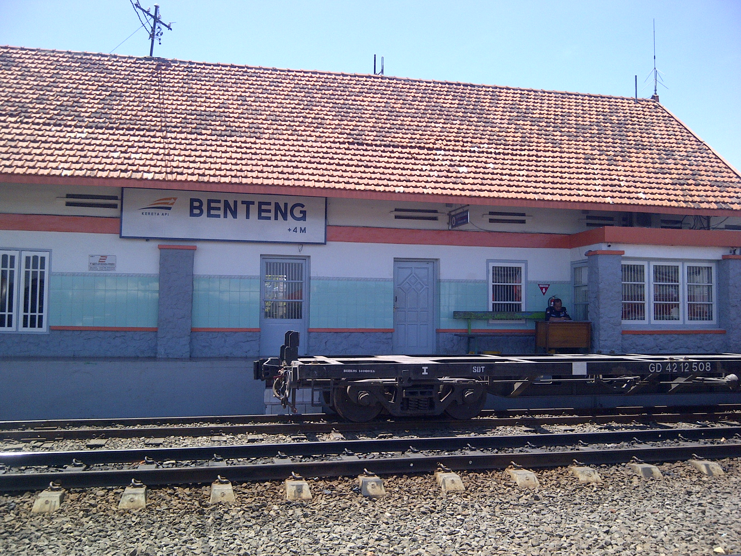 Bangunan utama Stasiun Benteng